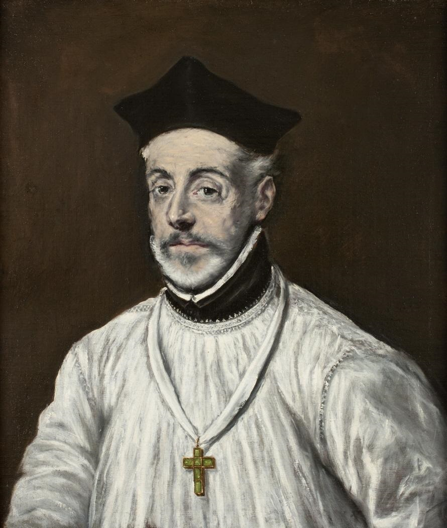 Retrato del eclesiástico español Diego de Covarrubias (1512-1577), que llegó a ser obispo de Ciudad Rodrigo, Segovia y Cuenca y arzobispo de Santo Domingo.